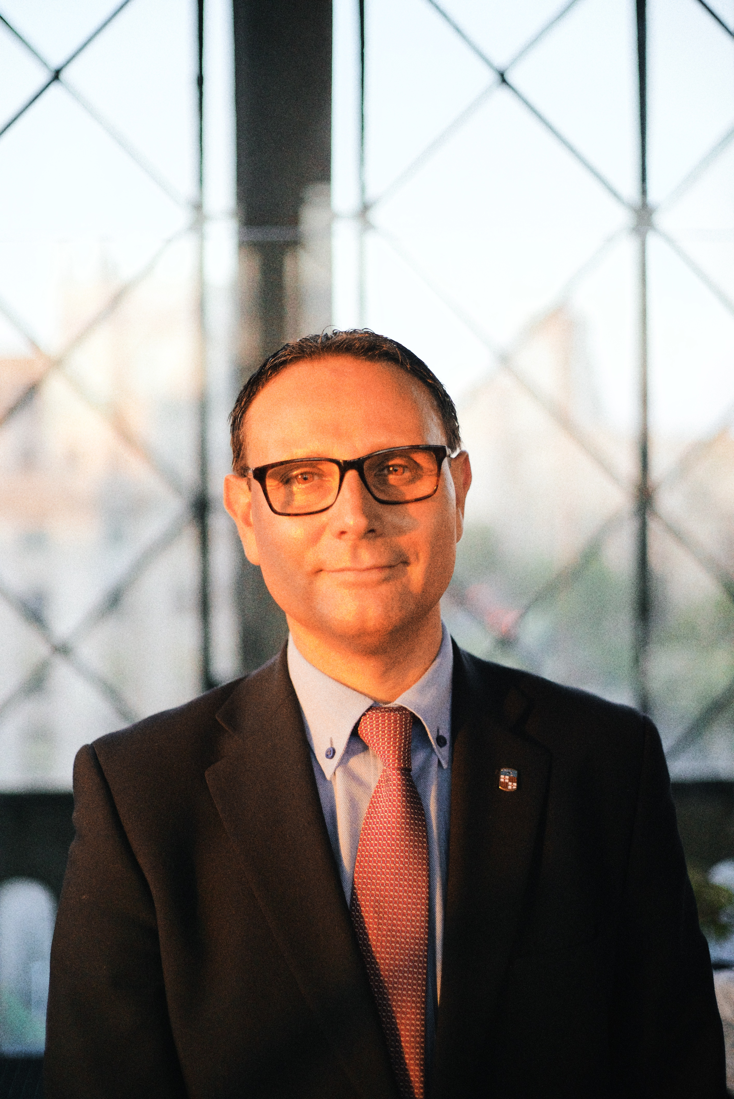 David Vallespín